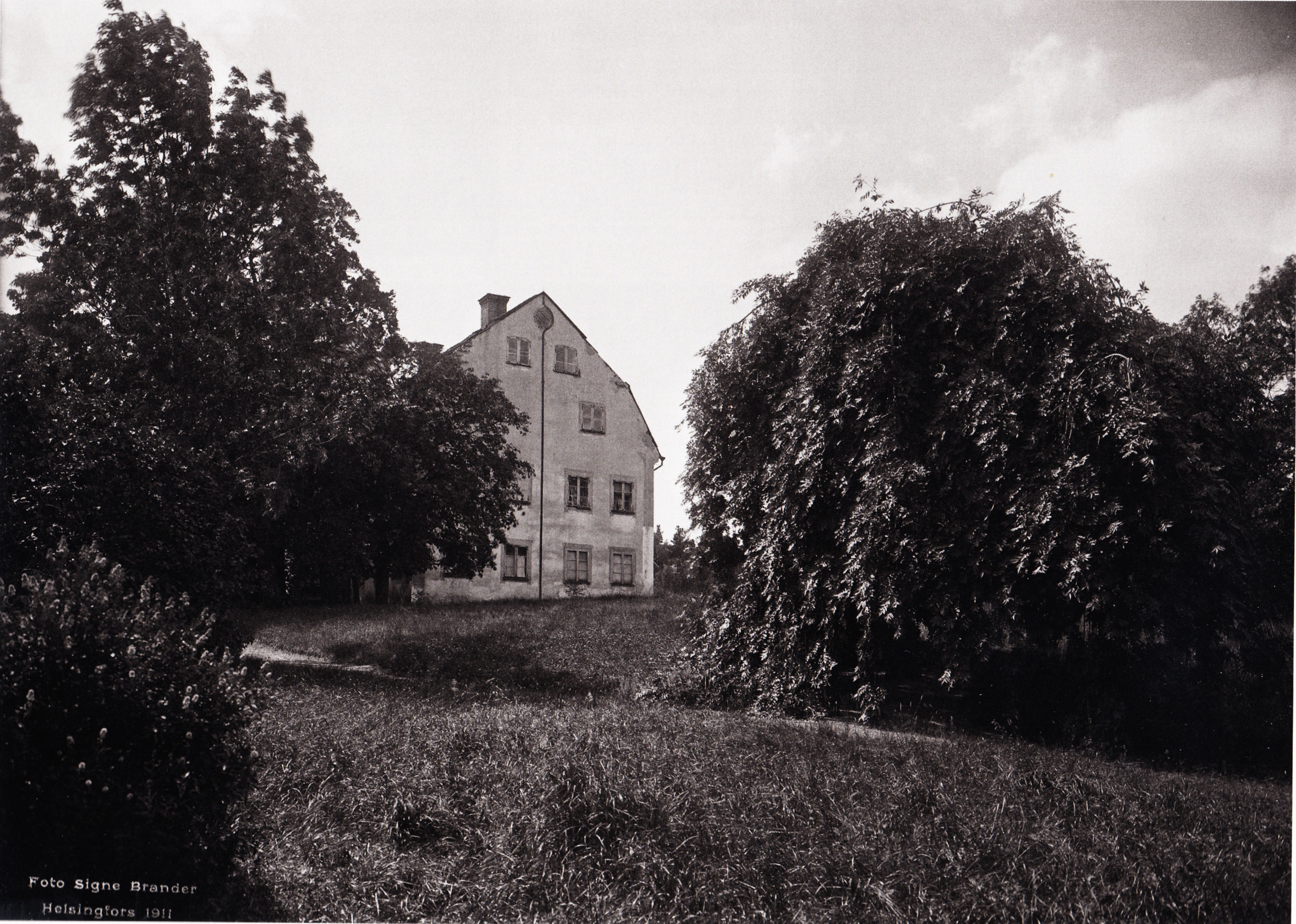 Lempisaaren kartano